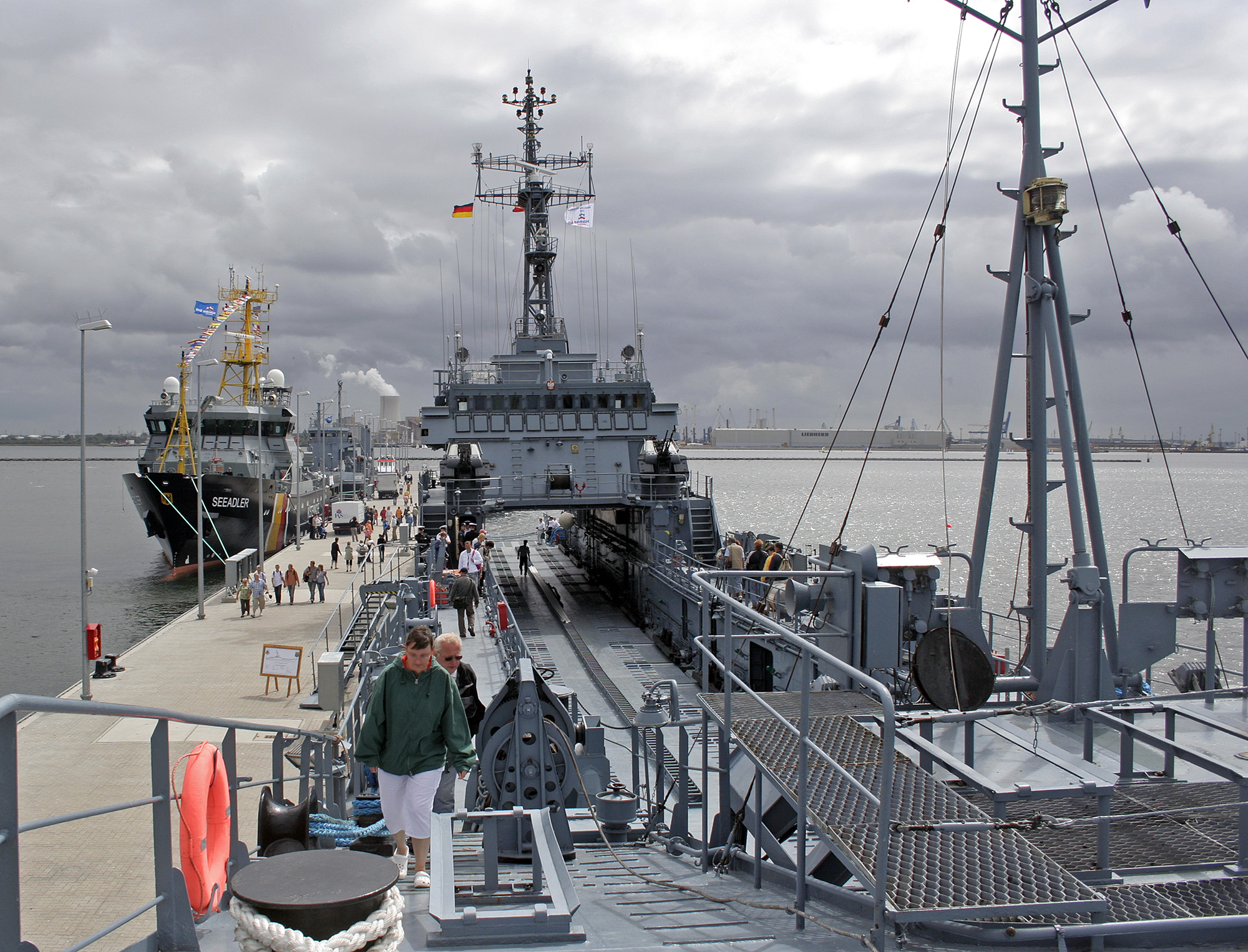 Dieses Bild zeigt ein Landungsschiff der Polnischen Marine (Lublin Class - Medium Landing Ship - Type 767) zu Besuch im Marinestützpunkt "Hohe Düne" anlässlich der Hanse Sail 2008.